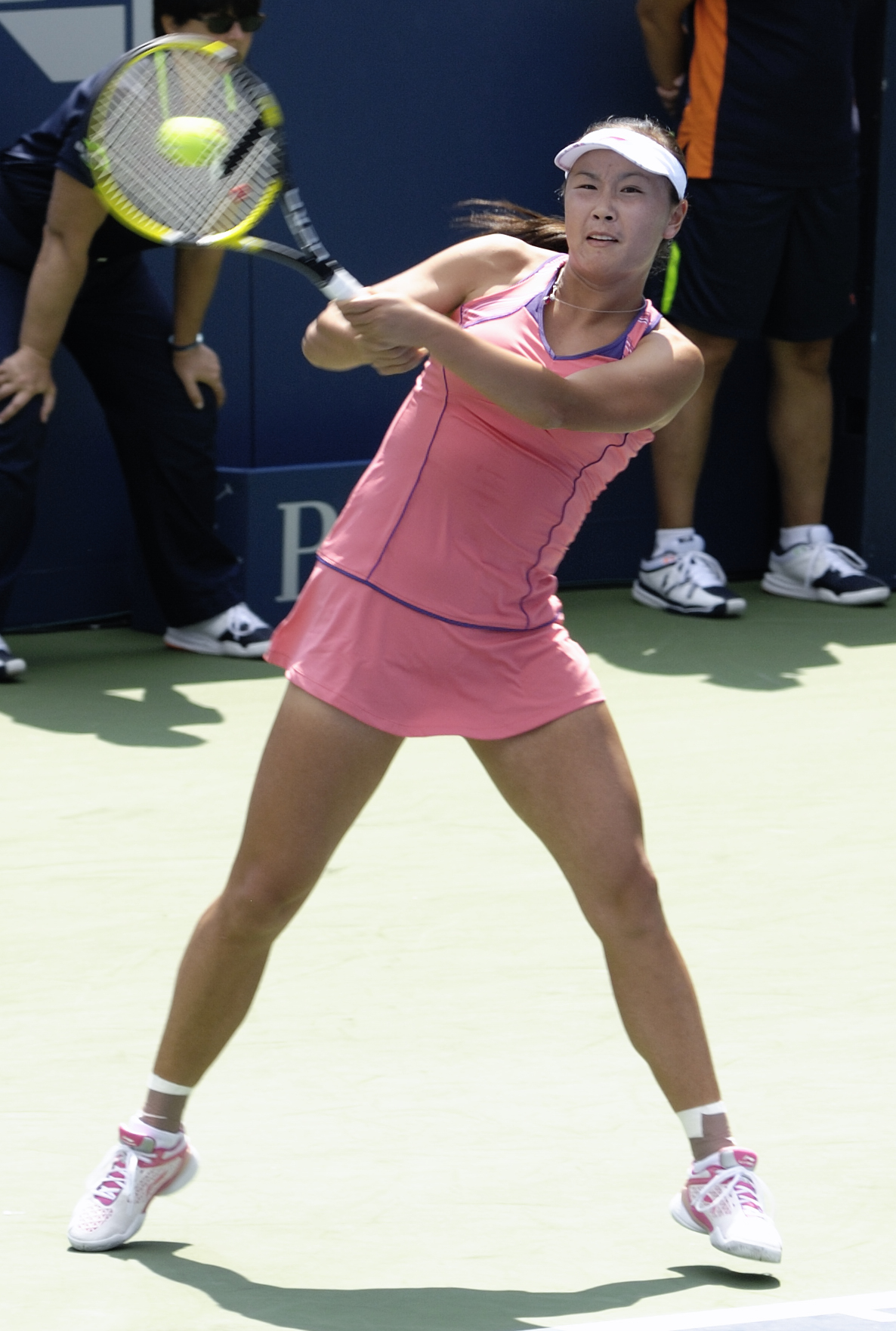 Peng Shuai